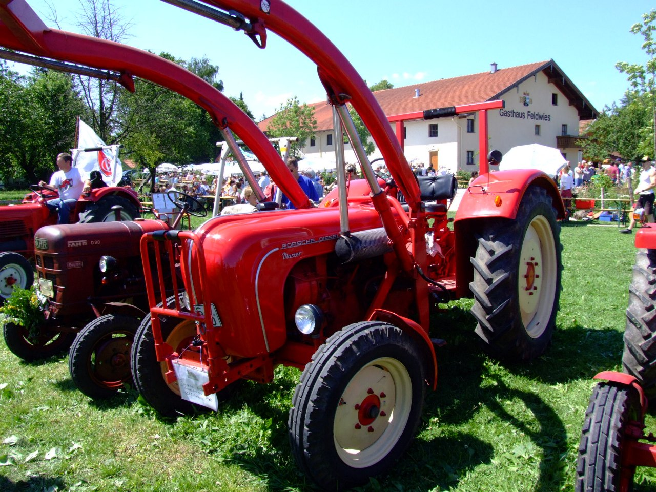 Porsche Master mit 50 PS, Baujahr 1960